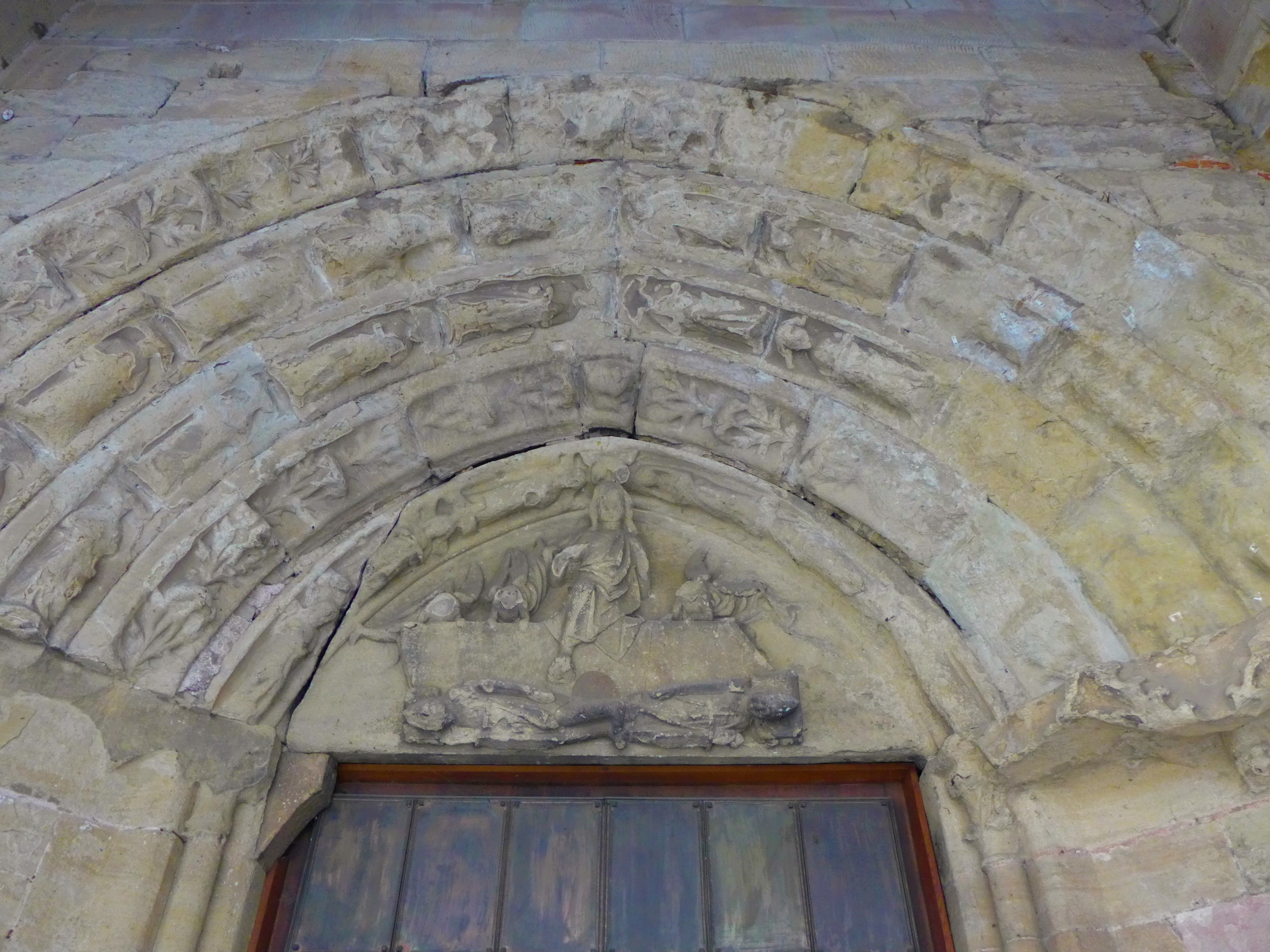 Benediktinerabtei St. Mauritius (Tholey), Bogenfeld des Portals mit auferstehendem Christus